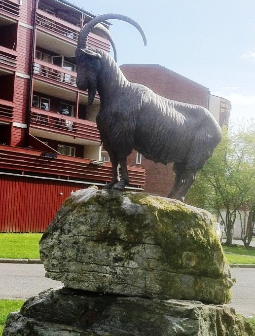 Geitebukken Bertram er laget av Oddmund Raudberget, og ble avduket juni 2012.